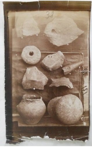 Laura Coltofean: Photograph representing artefacts from Zsófia Torma’s archaeological collection (ANDJH, Zs. Torma Fonds, Dos. 1/1844-1901, f. 38).